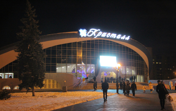 ЛДС "Кристал